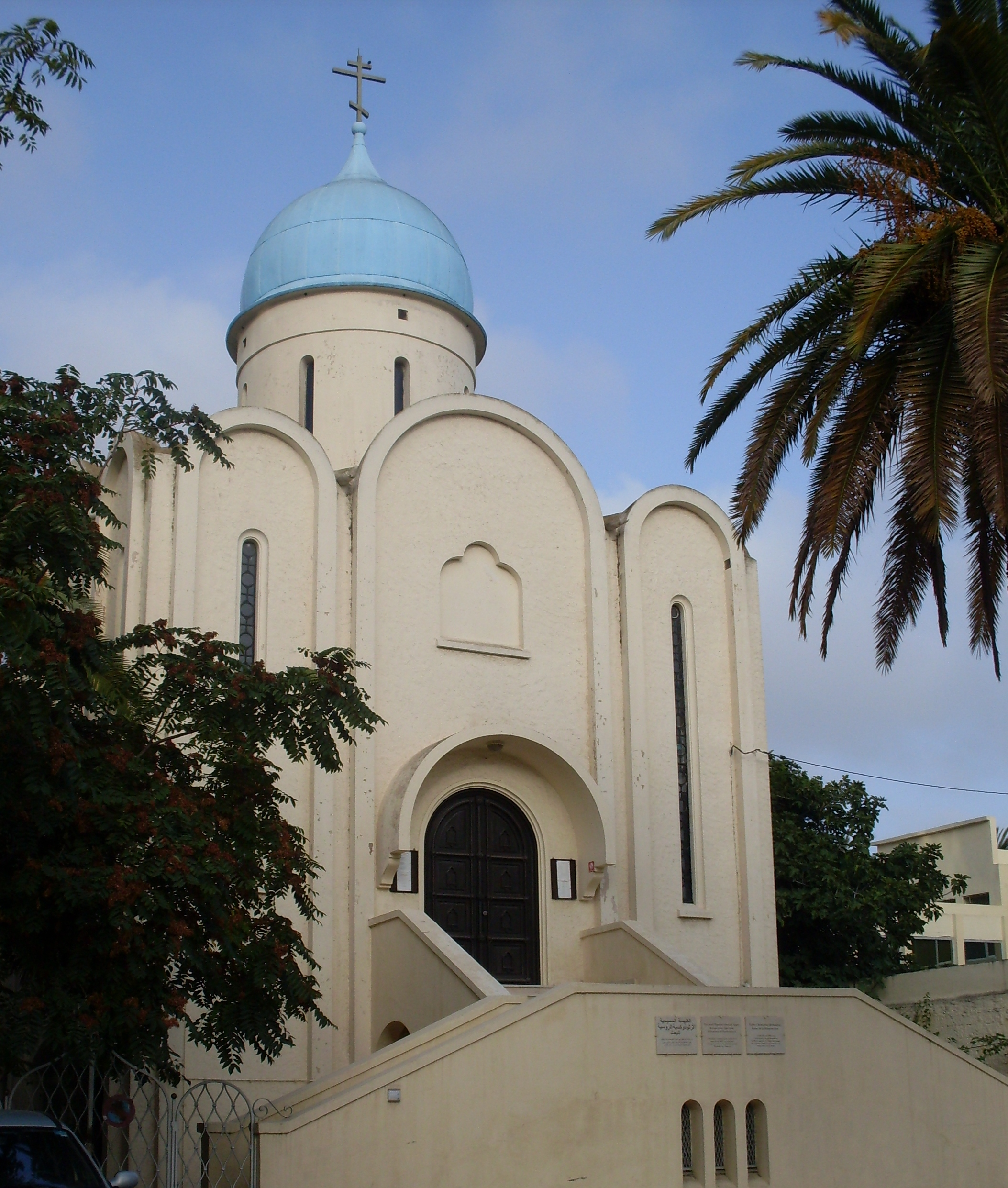 Eglise Orthodoxe Russe de la résurrection, 19 Avenue Mohamed V.